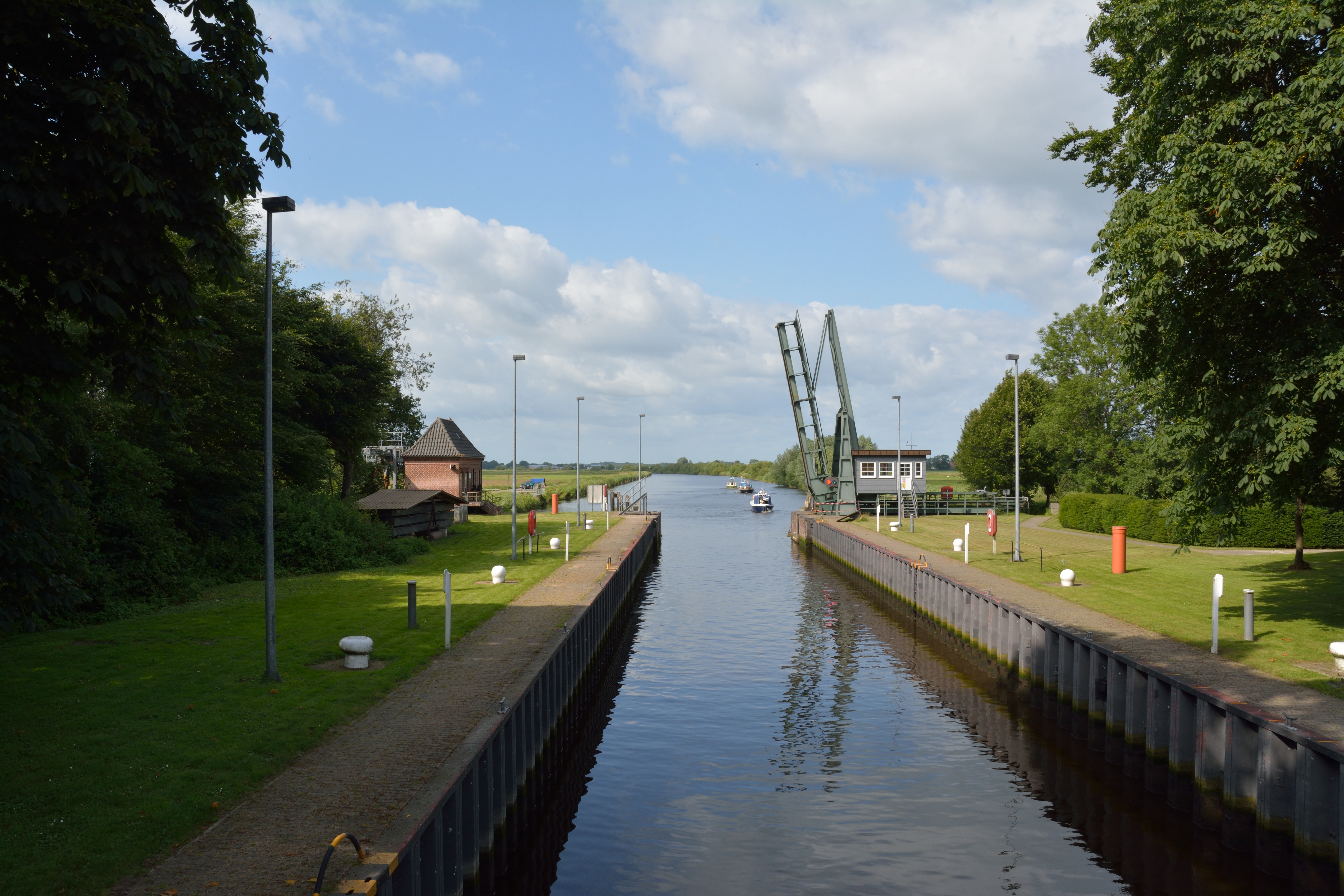 Schleuse mit Klappbrücke am Gieselaukanal